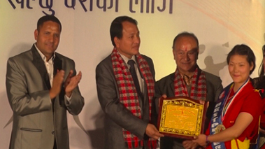 नेपाली: Nima Gharti Magar